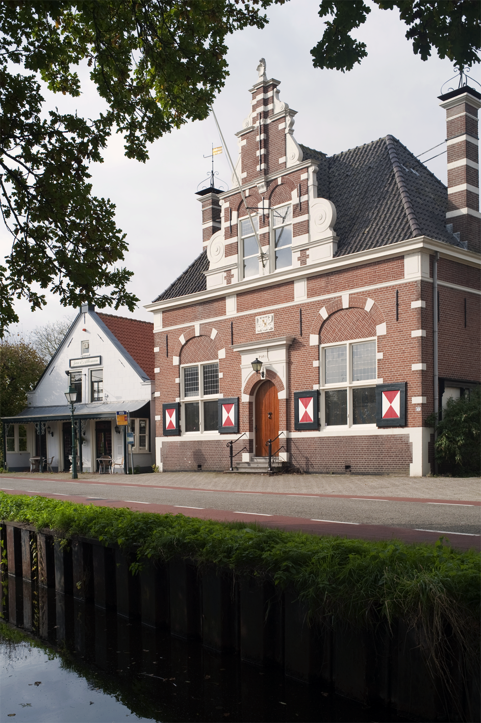 Kortenhoefsedijk 155